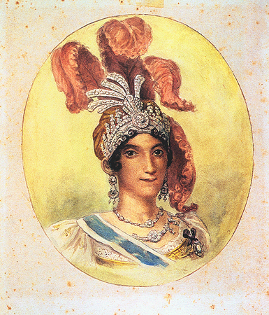 Rainha Carlota Joaquina do Brasil